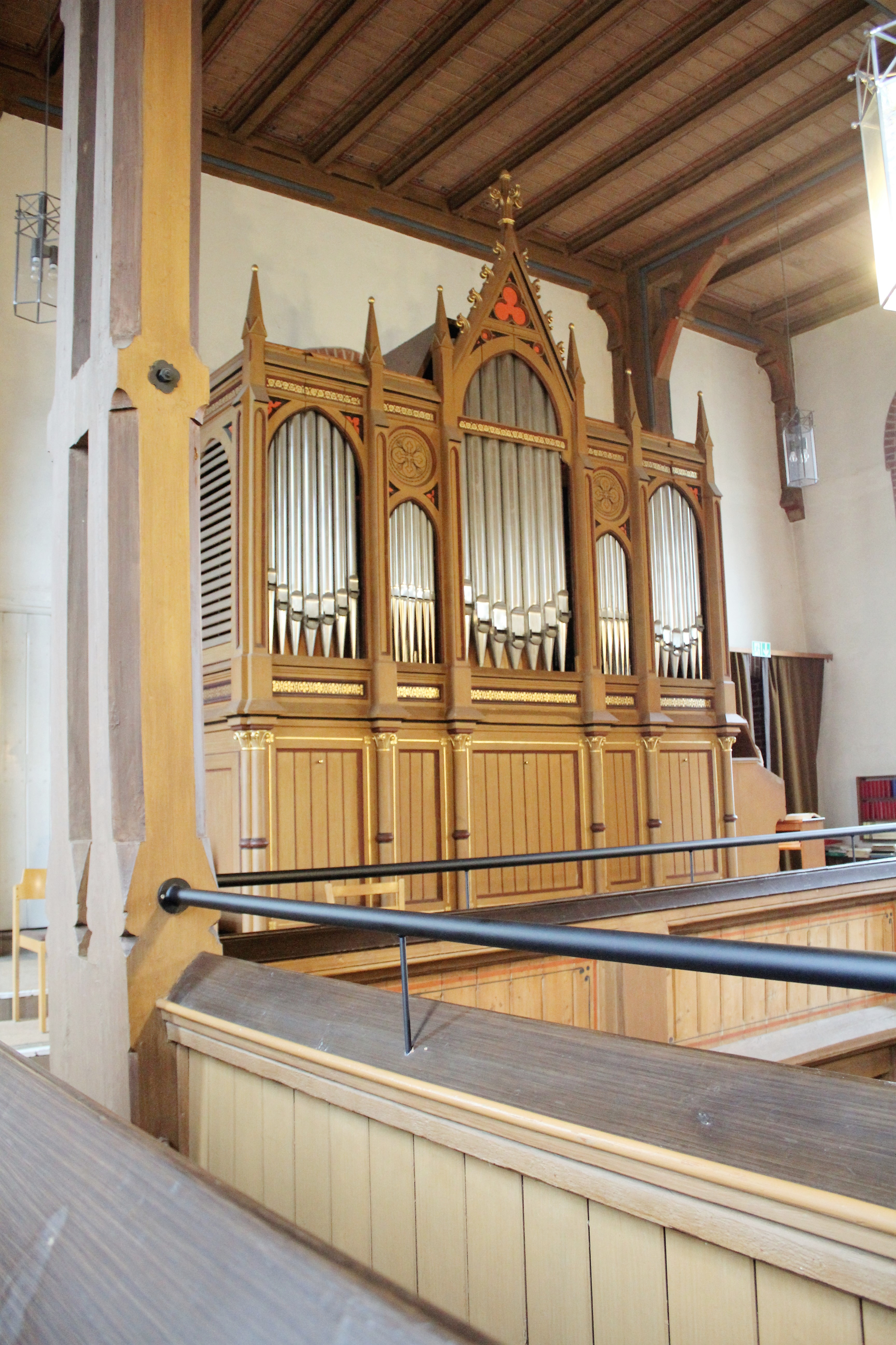 Evangelische Kirche Burgsolms, Solms, Lahn-Dill-Kreis, Hessen, Deutschland